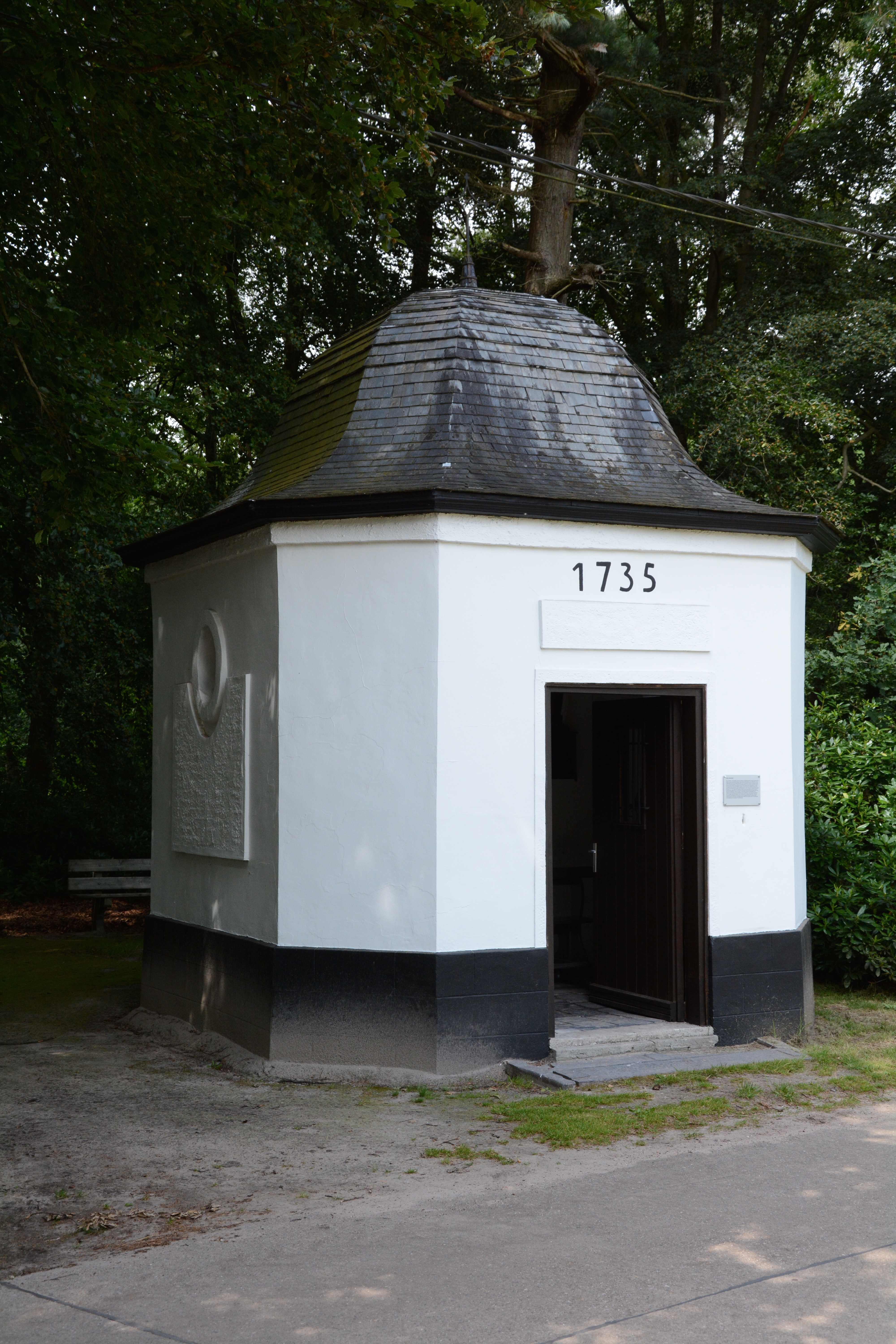 Rovertkapel, Ravels